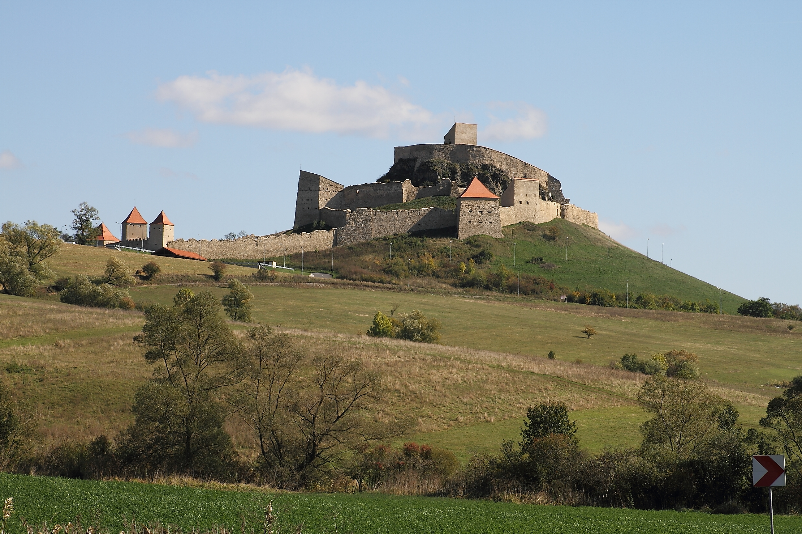 Cetatea Rupea (Cetatea Cohalmului)